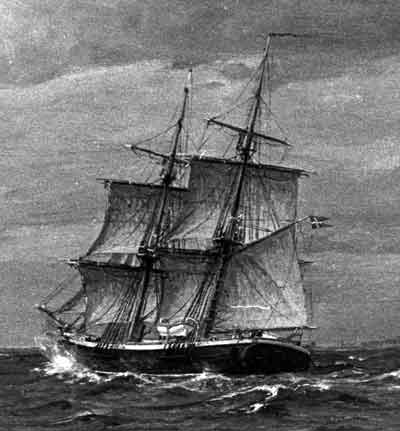 Drawing with pencil From the Danish Maritime Museum